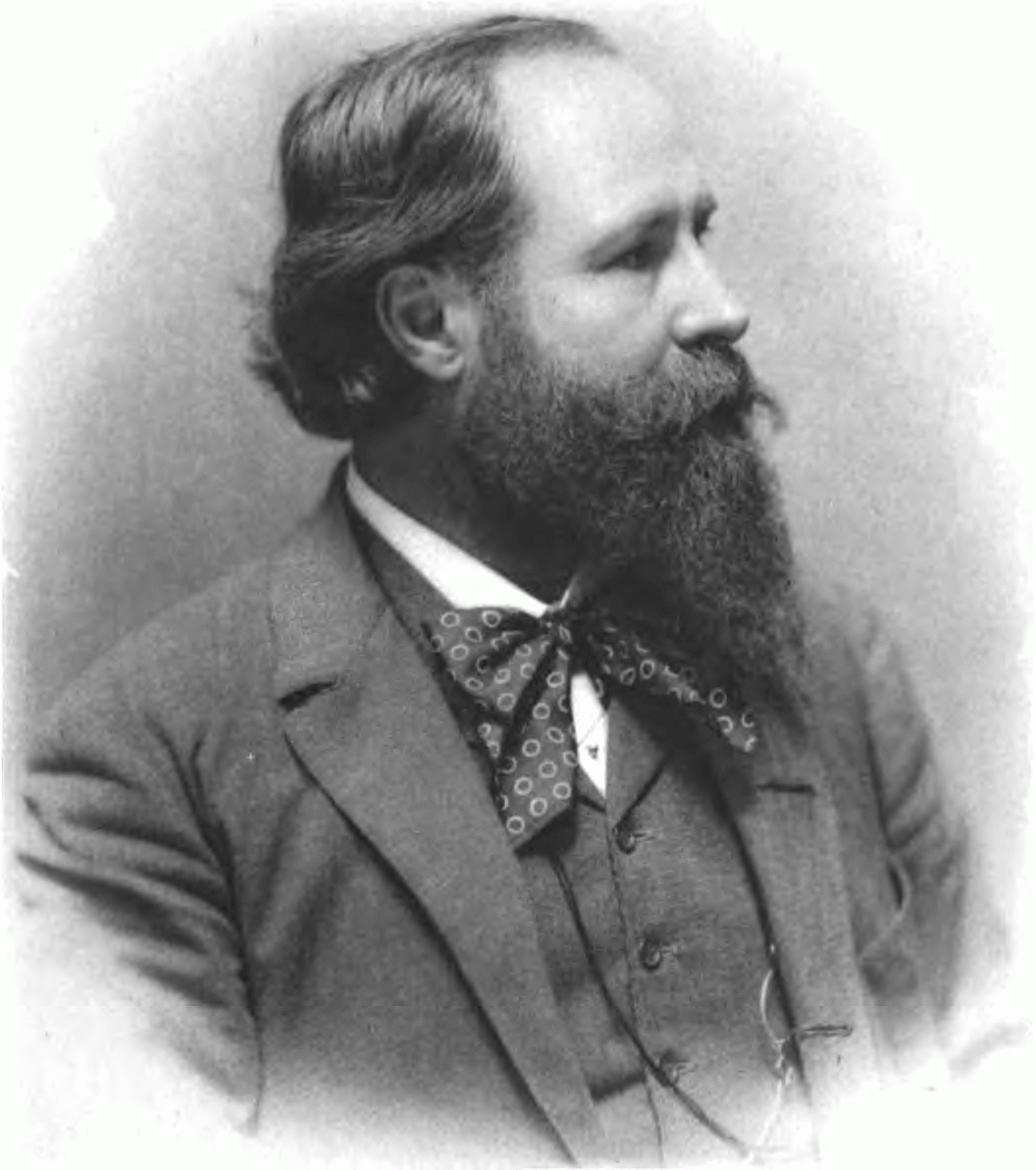 Fritz Luckhardt (1843-1894), Austrian photographer